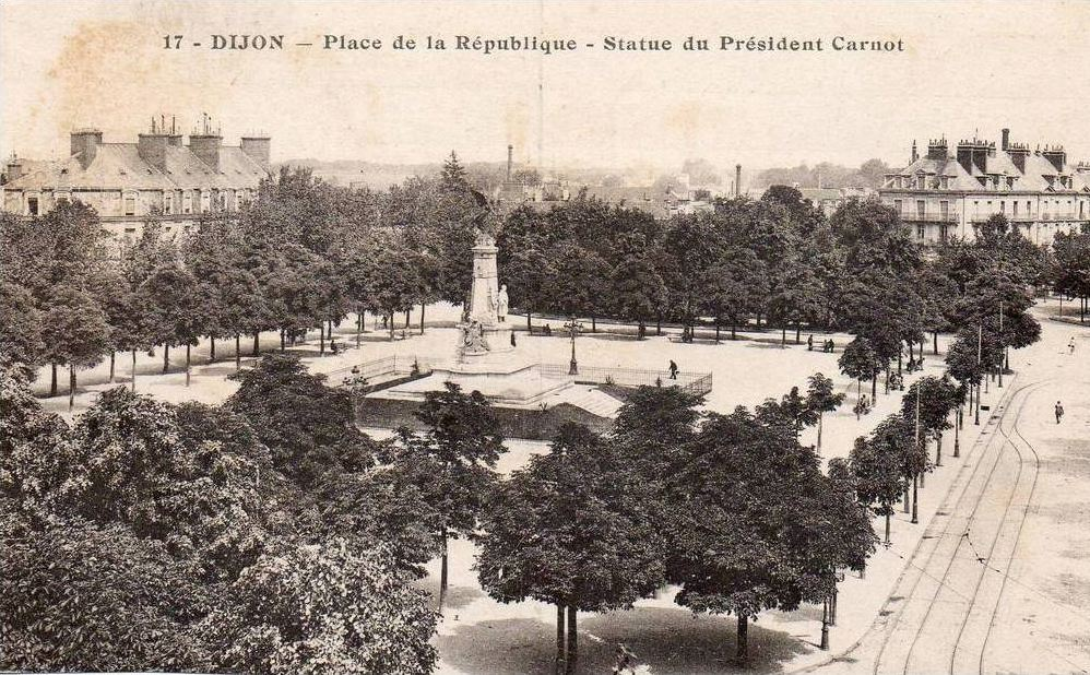 Carte postale n°17 : DIJON - Place de la République